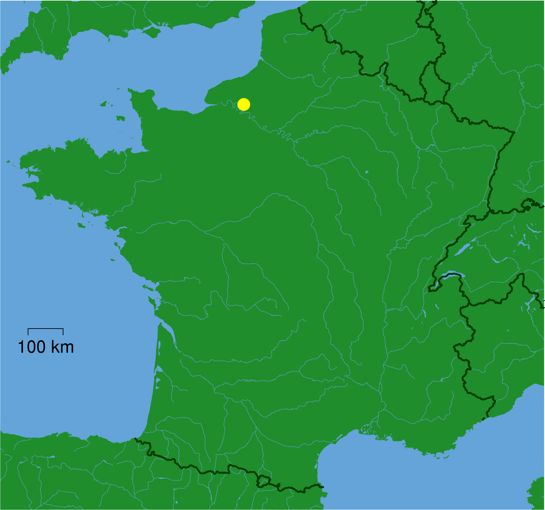 Poloha.